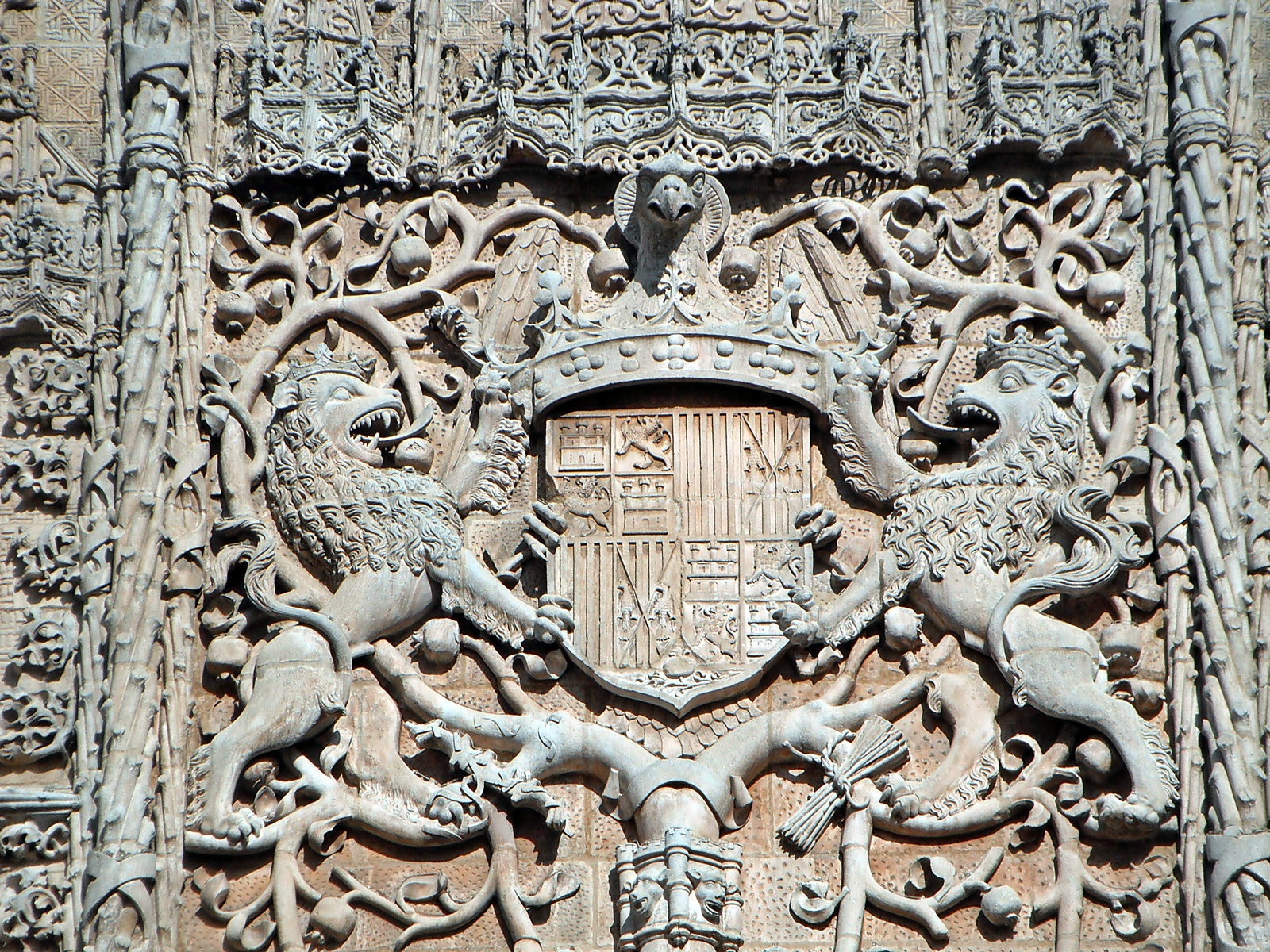 Fachada del Colegio de San Gregorio (Valladolid)